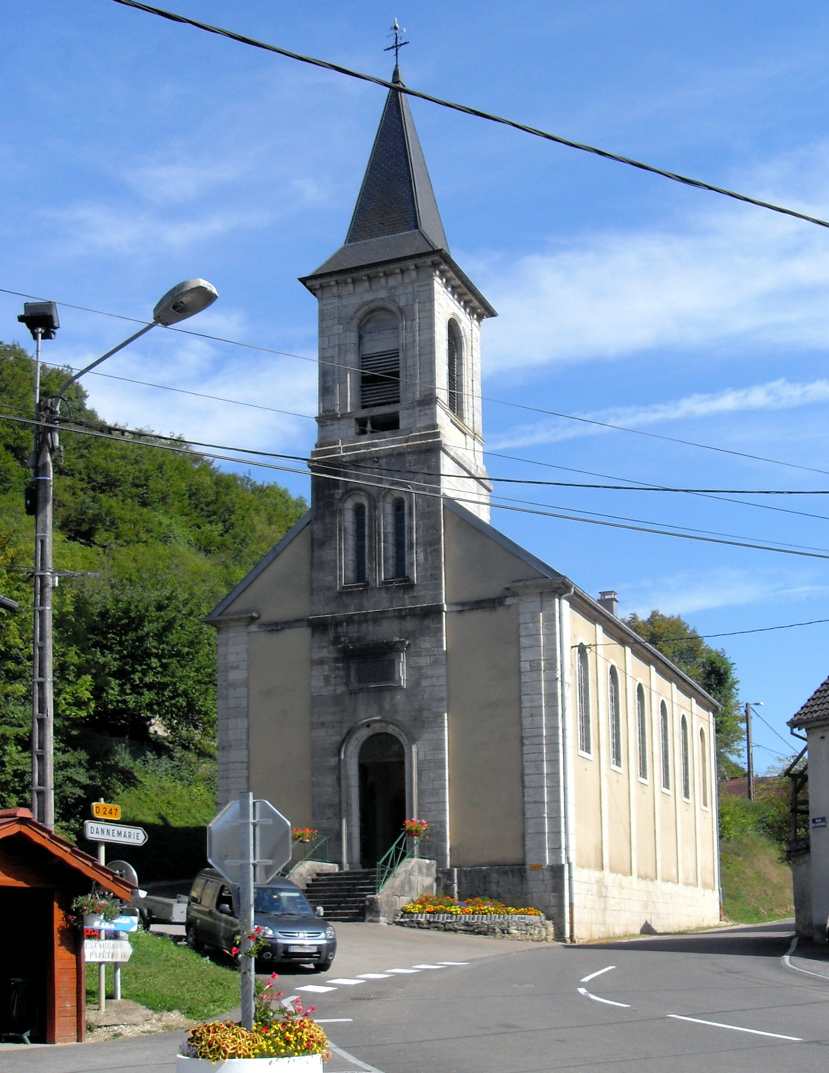 Le temple protestant de Glay